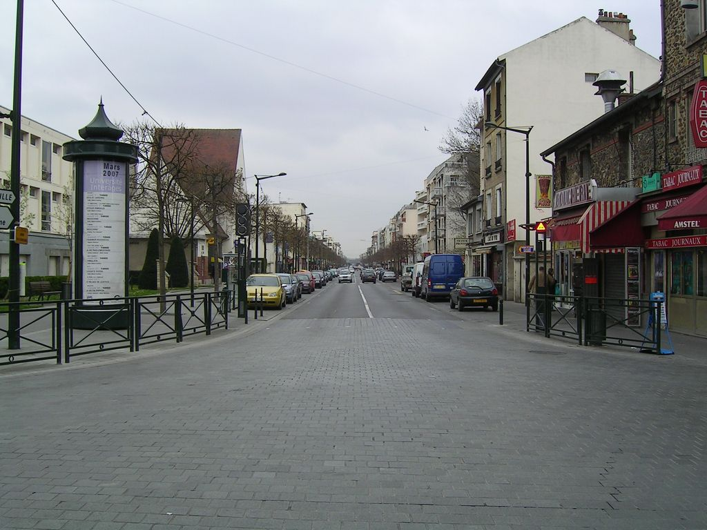 Avenue de la Résistance Chelles (Seine-et-Marne) Photo personnelle (own work) de Marianna